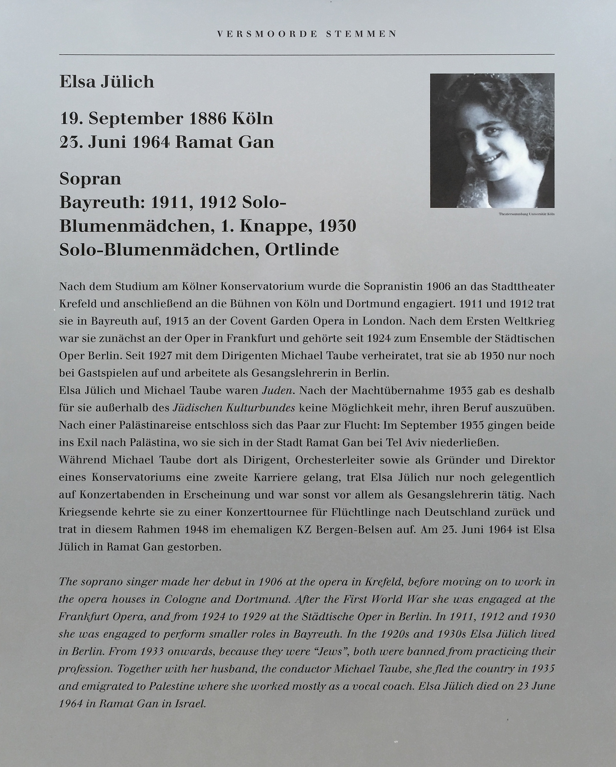 "Verstummte Stimmen - Die Bayreuther Festspiele und die 'Juden' 1876 bis 1945", Ausstellung 2016